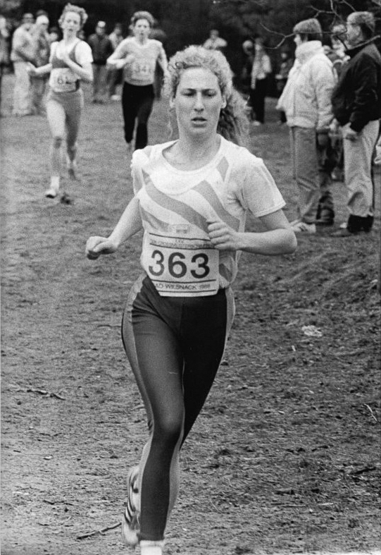 Andrea Fleischer ADN-ZB Pätzold-27.3.88 Bez. Schwerin: 25. DDR-Cross-Meisterschaften in Bad Wilsnack- Im Hauptlauf der Frauen über 2.000 m siegte Andrea Fleischer (SC Motor Jena) in 6:26,1 min.